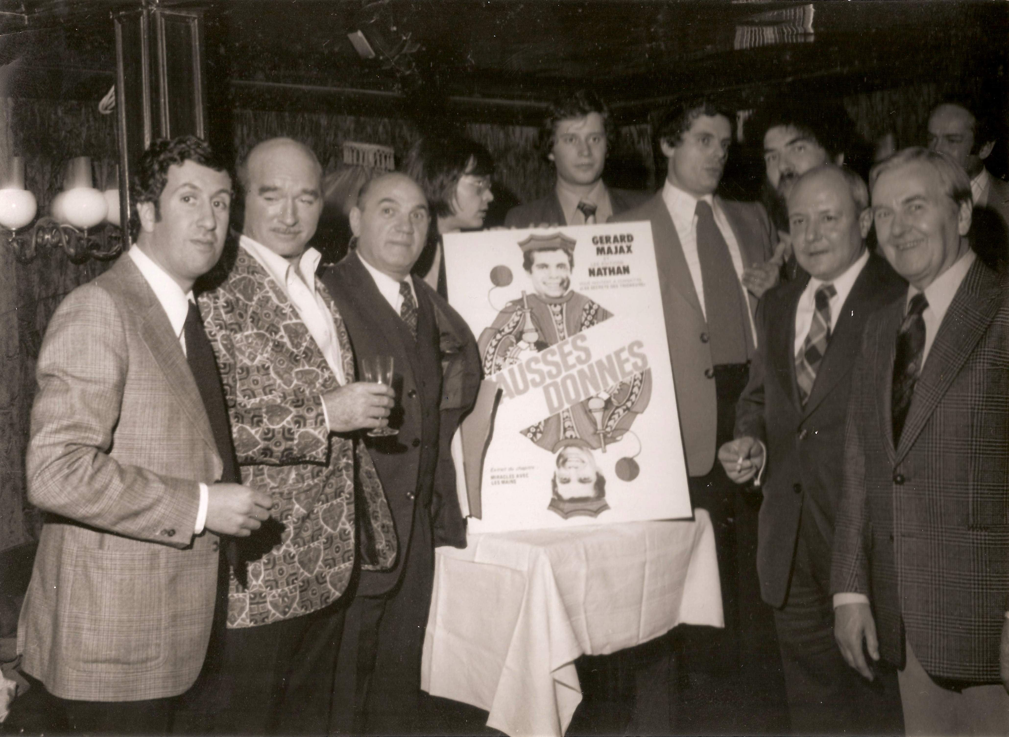 Stéphane Collaro, Eddy Barclay, Marcalbert, Blom, Gérard Majax, Gérard Kunian, Michel Hatte, Henk Vermeyden